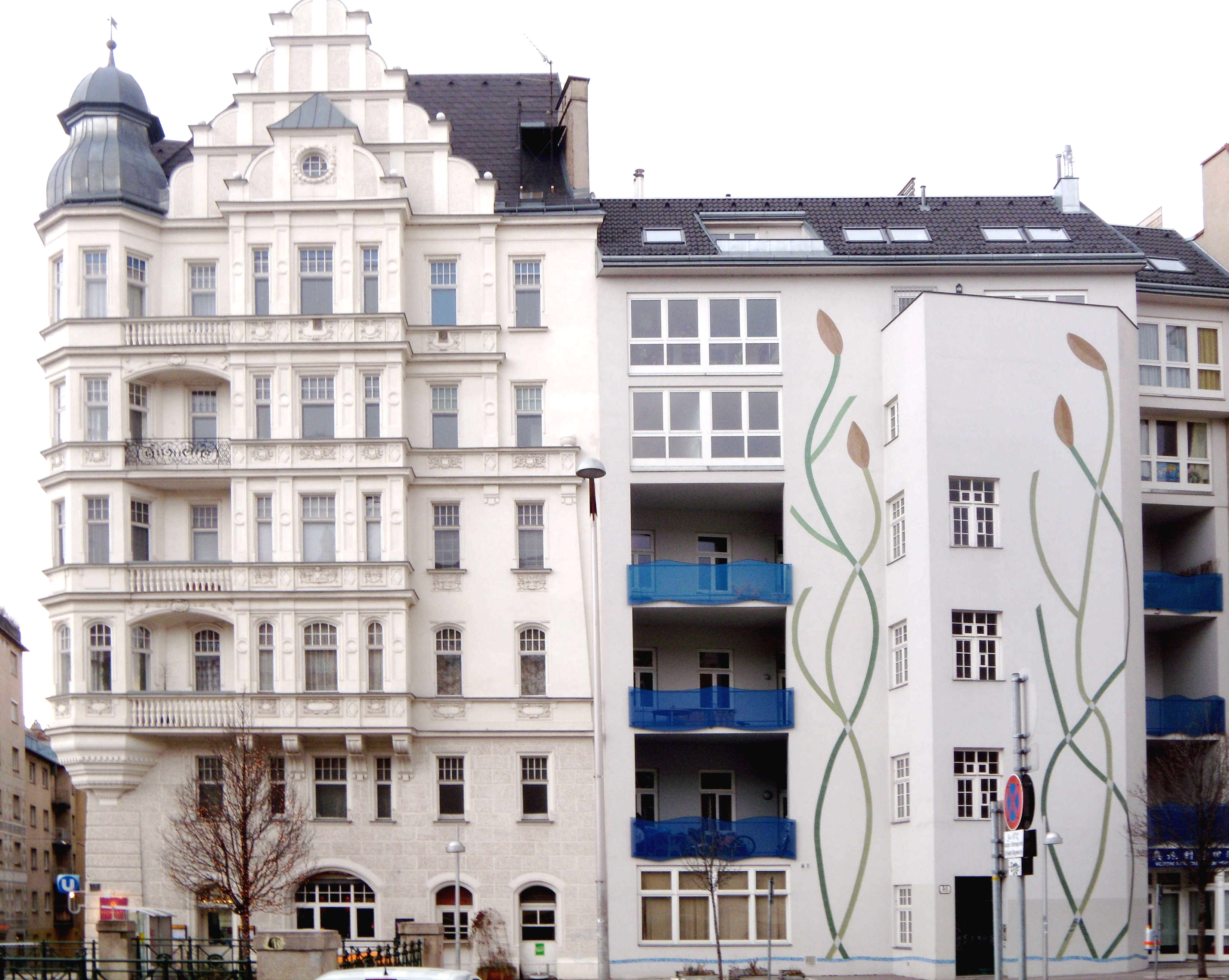 Wien-Margareten, Rechte Wienzeile 49 und 51, 1050 Wien, Österreich